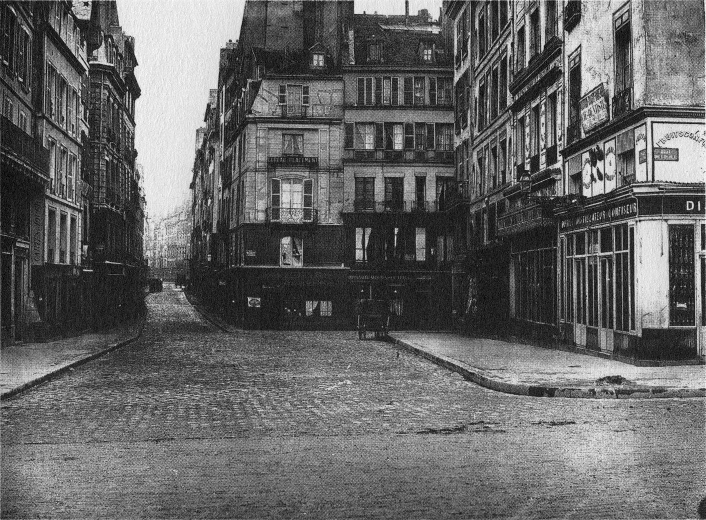 La place de l'École dans la seconde partie du au XIXe siècle, vue depuis le quai du Louvre (Paris, Ier arrondissement)